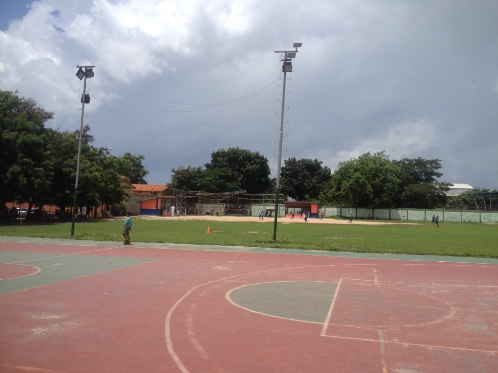 Cancha fundacion mendoza maracay